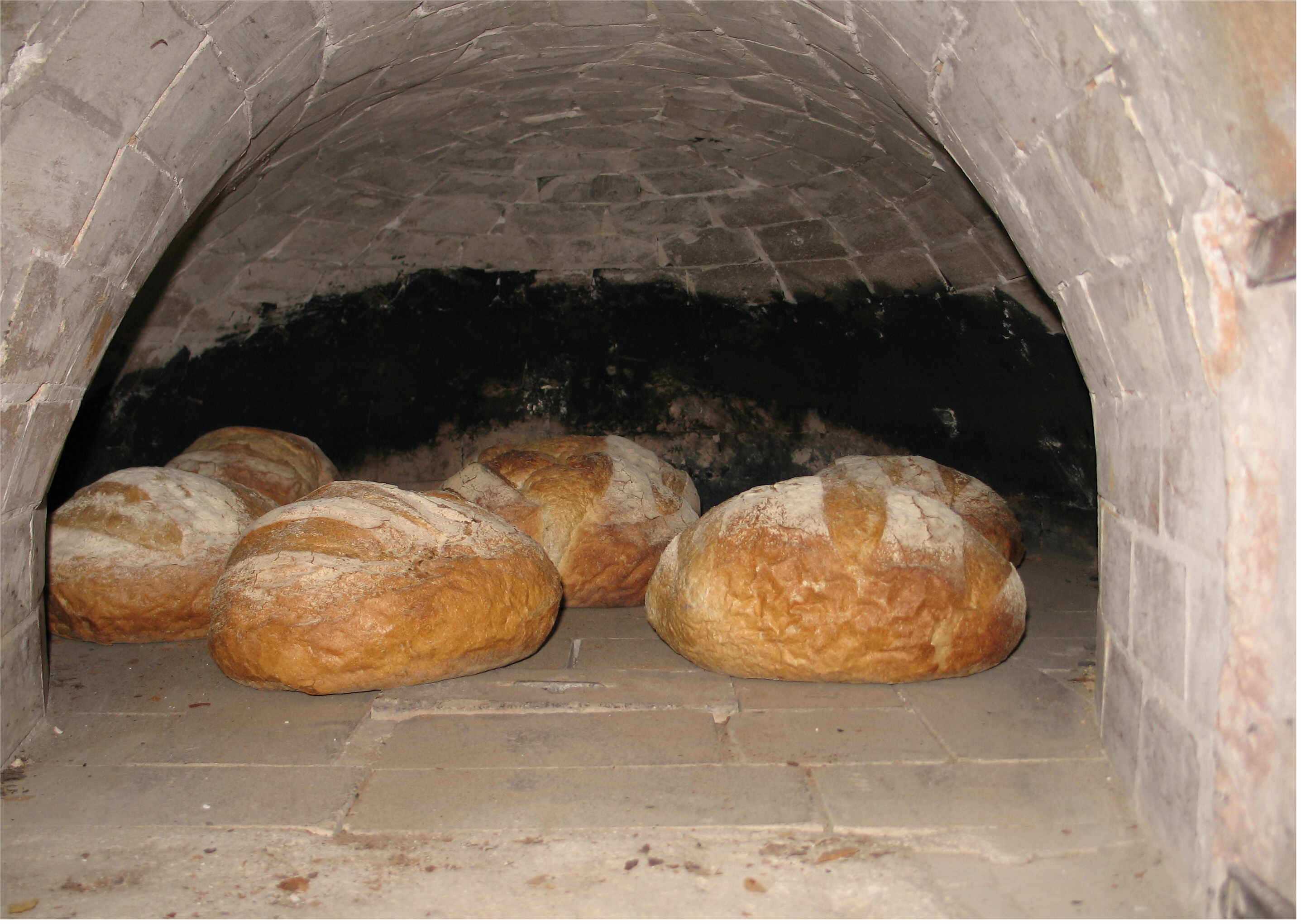 Brout frësch aus dem Bakuewen. Kategorie:Liewensmëttel